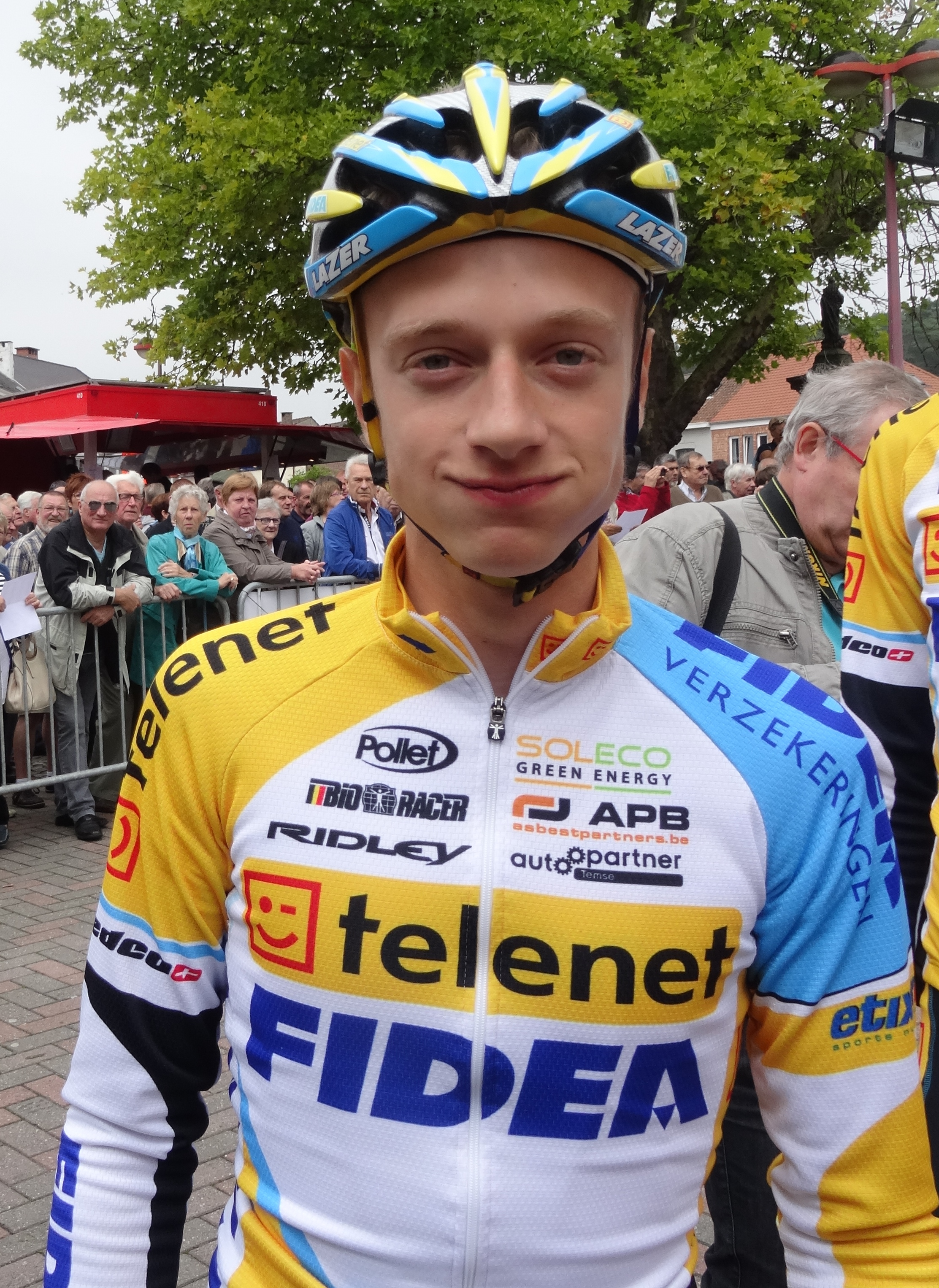 Reportage photographique réalisé le mercredi 27 août à l'occasion du départ de la Druivenkoers Overijse 2014 à Huldenberg, Belgique.